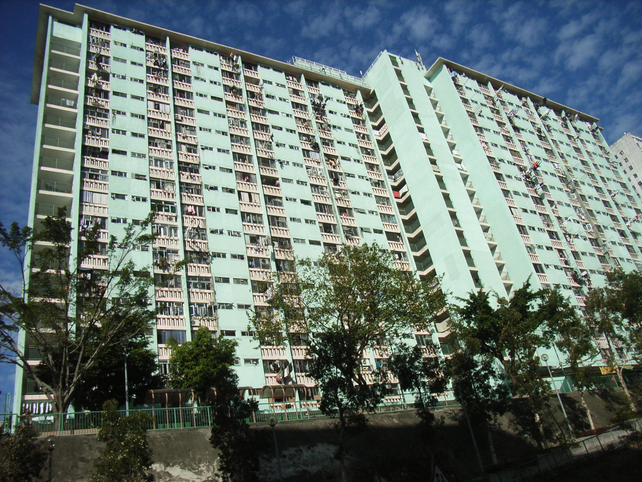 Ap Lei Chau Estate, Hong Kong Photographer:User:Apade1872